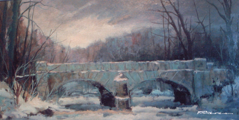 Stanislav Příhoda